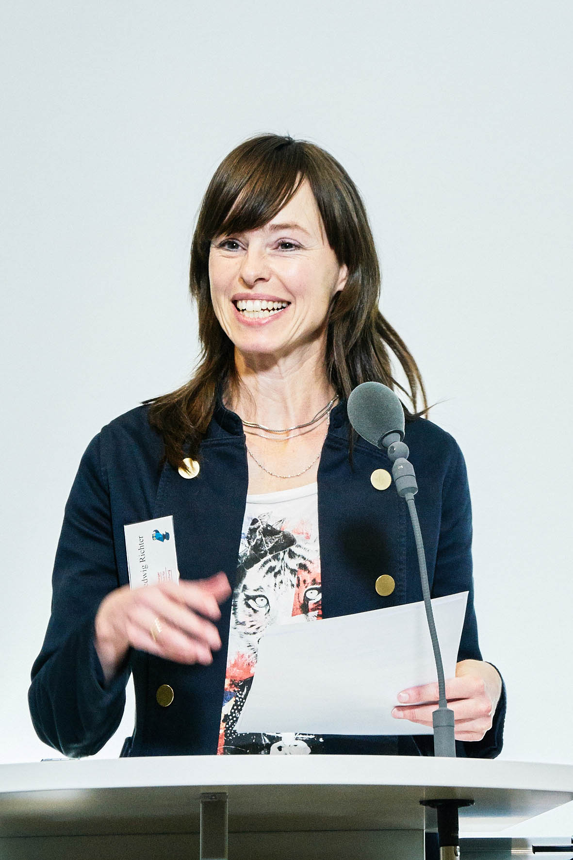 Prof. Dr. Hedwig Richter